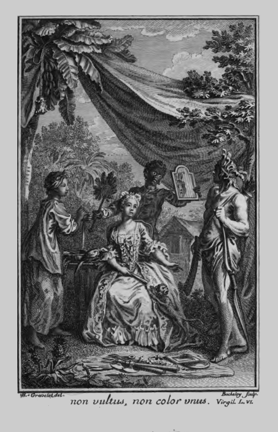 Non vultus, non color unus, Frontispice pour Claude-Nicolas Le Cat (1700-1768).- Traité de la couleur de la peau humaine en général, de celle des nègres en particulier, et de la métamorphose d'une des couleurs en l'autre, soit de naissance, soit accidentellement, Amsterdam, 1765.